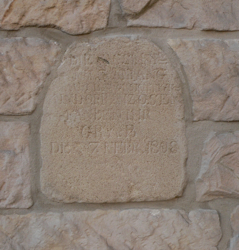 Gedenkstein an der Banneitzschen Villa am Ostertorwall zur Erinnerung an die Explosion im Februar 1808 beim Ostertor in einer Kasematte beim Entschärfen von Bomben, bei der 9 Franzosen getötet wurden. Die Cassimat-Nor. 3 sprang aus Unvorsichtigk - und 9 Franzosen fanden ihr Grab den 7. Febr. 1808